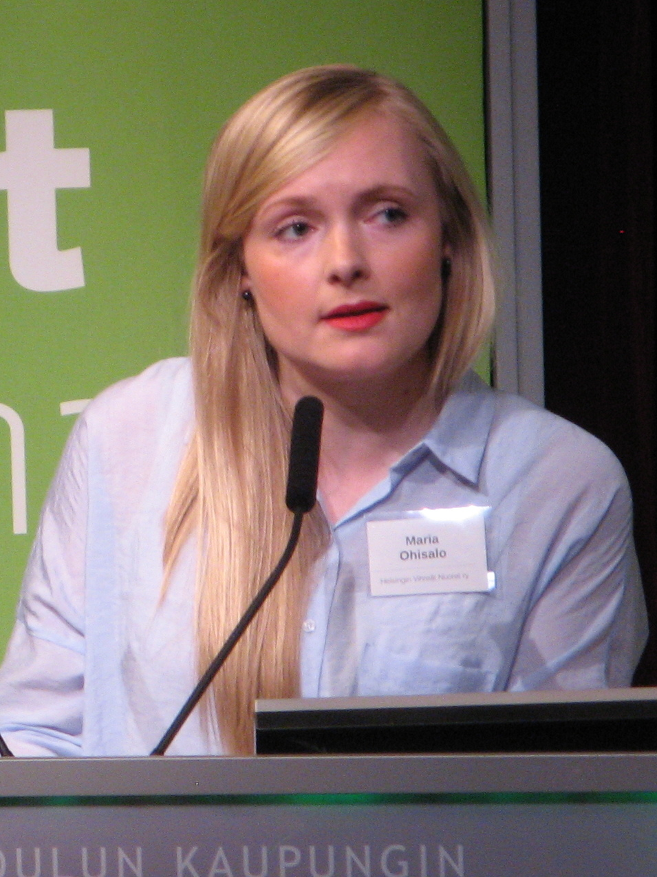 Maria Ohisalo